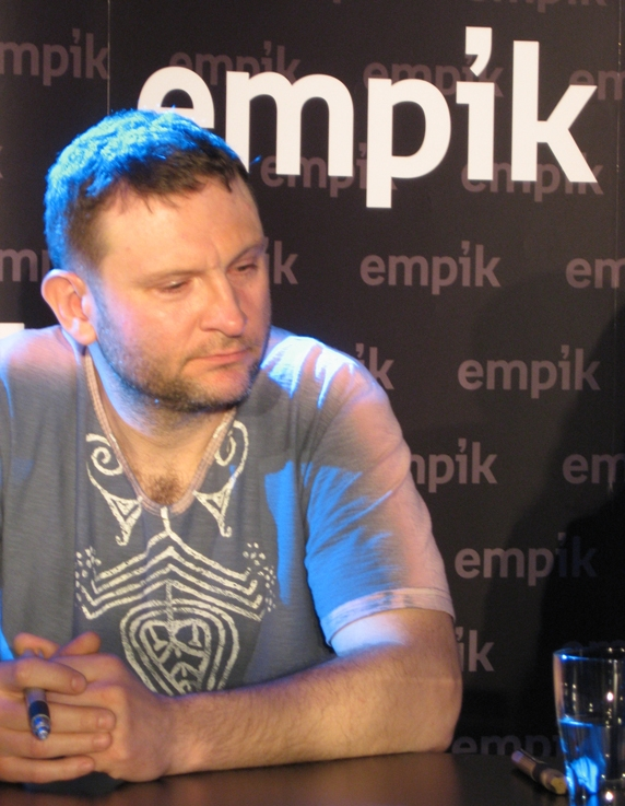 Zespół Bajm podpisuje swoją najnowszą płytę Ballady 2 w Salonie Empik Junior w Warszawie (7 kwietnia 2008). Na zdjęciu Krzysztof Nieścior.